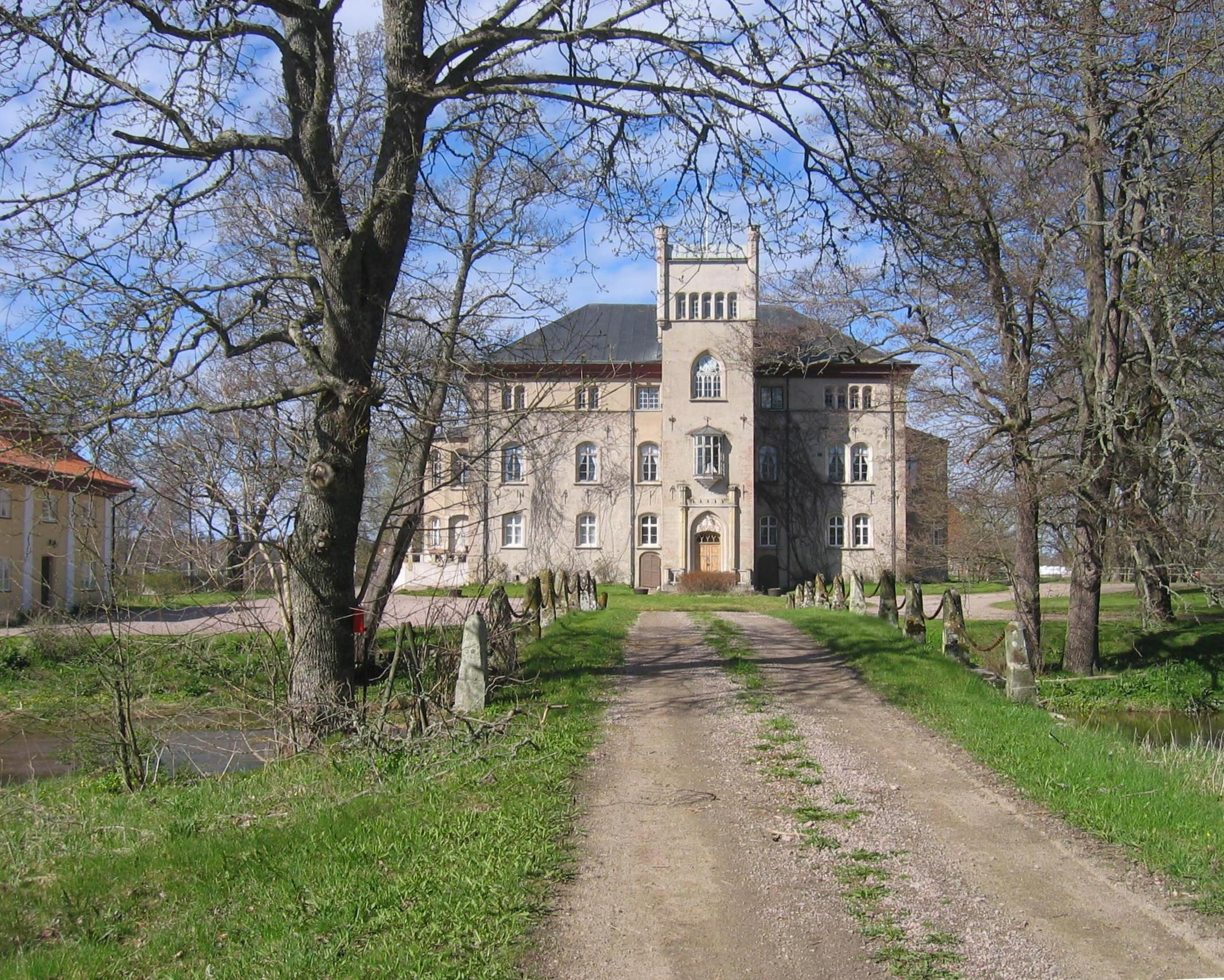 Börstorps_slott, bild tagen 2005 av mig själv. Photograph taken by me.